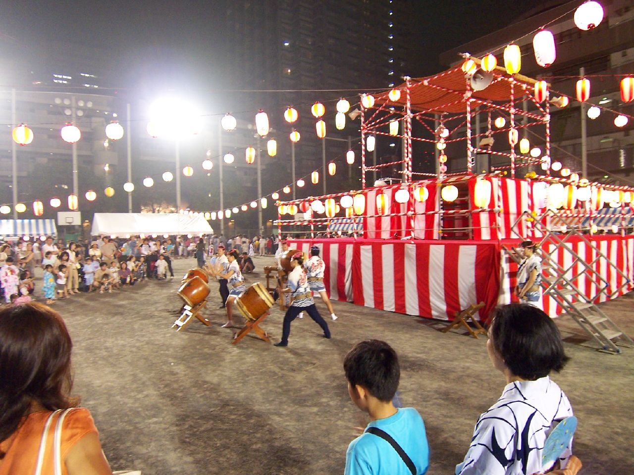 No description